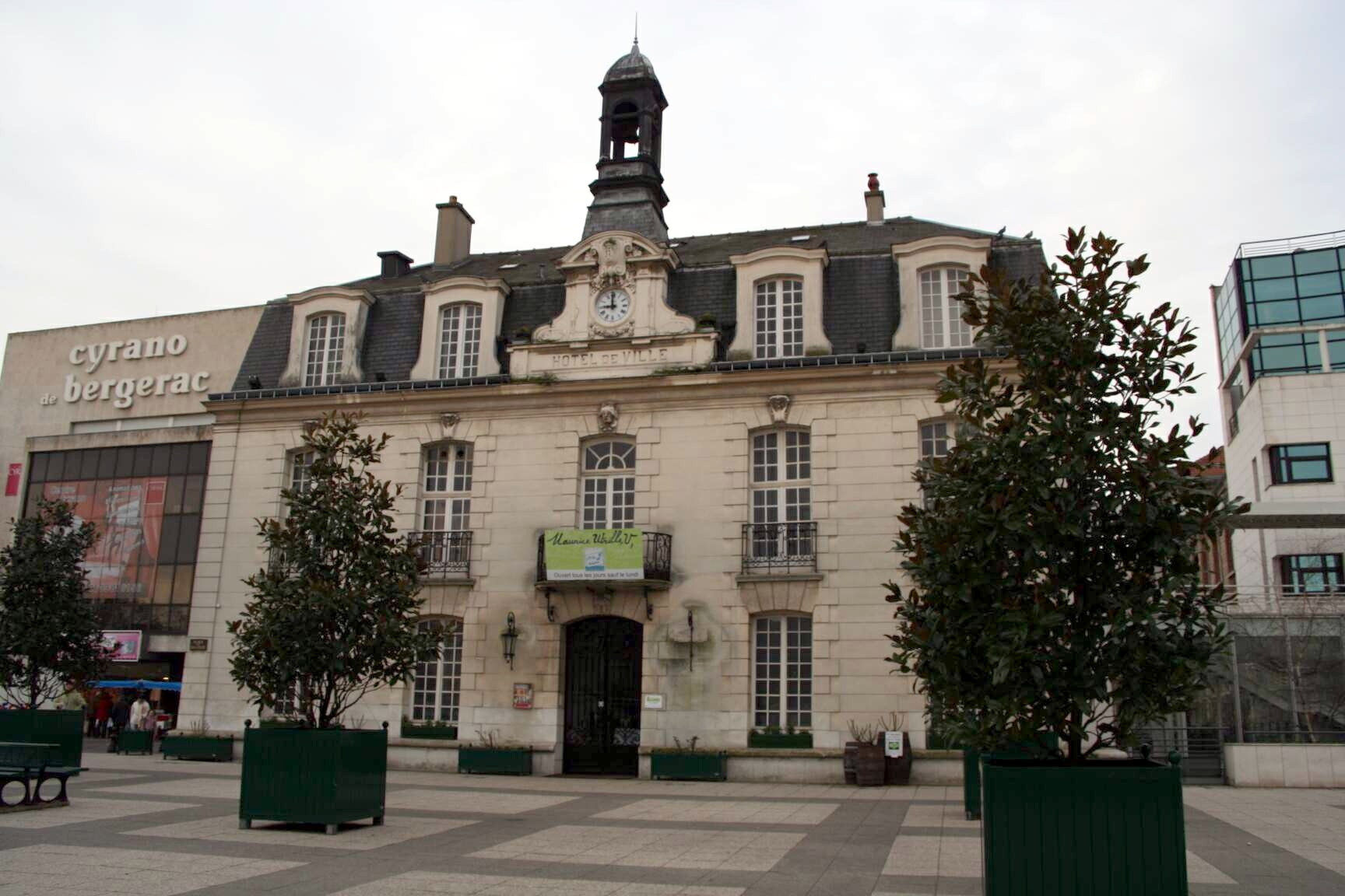 Musée Utrillo-Valadon à Sannois - Val-d'Oise (France)